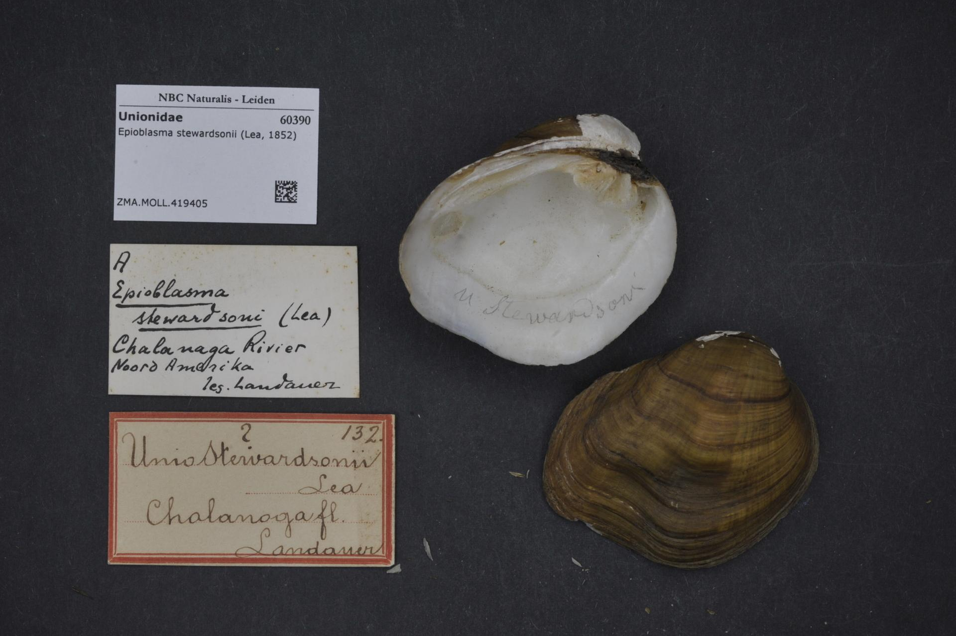 Epioblasma stewardsonii (Lea, 1852)